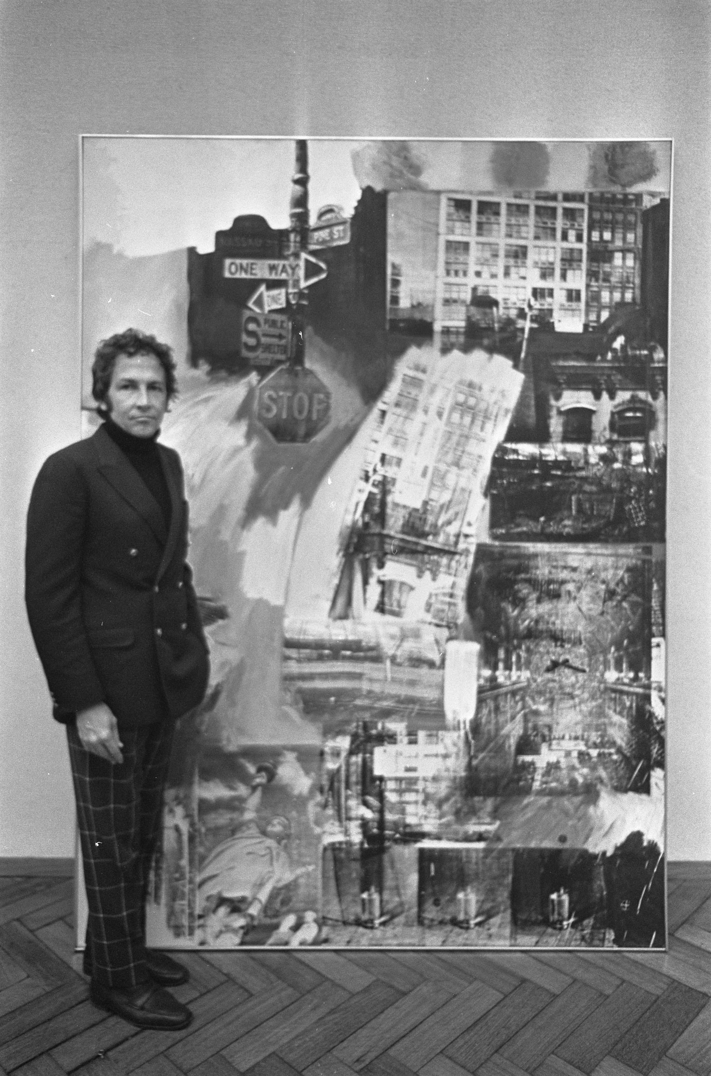 Collectie / Archief : Fotocollectie Anefo Reportage / Serie : [ onbekend ] Beschrijving : Robert Rauschenberg exposeert in Stedelijk Museum Datum : 21 februari 1968 Trefwoorden : musea Fotograaf : Nijs, Jac. de / Anefo Auteursrechthebbende : Nationaal Archief Materiaalsoort : Negatief (zwart/wit) Nummer archiefinventaris : bekijk toegang 2.24.01.05 Bestanddeelnummer : 921-0999